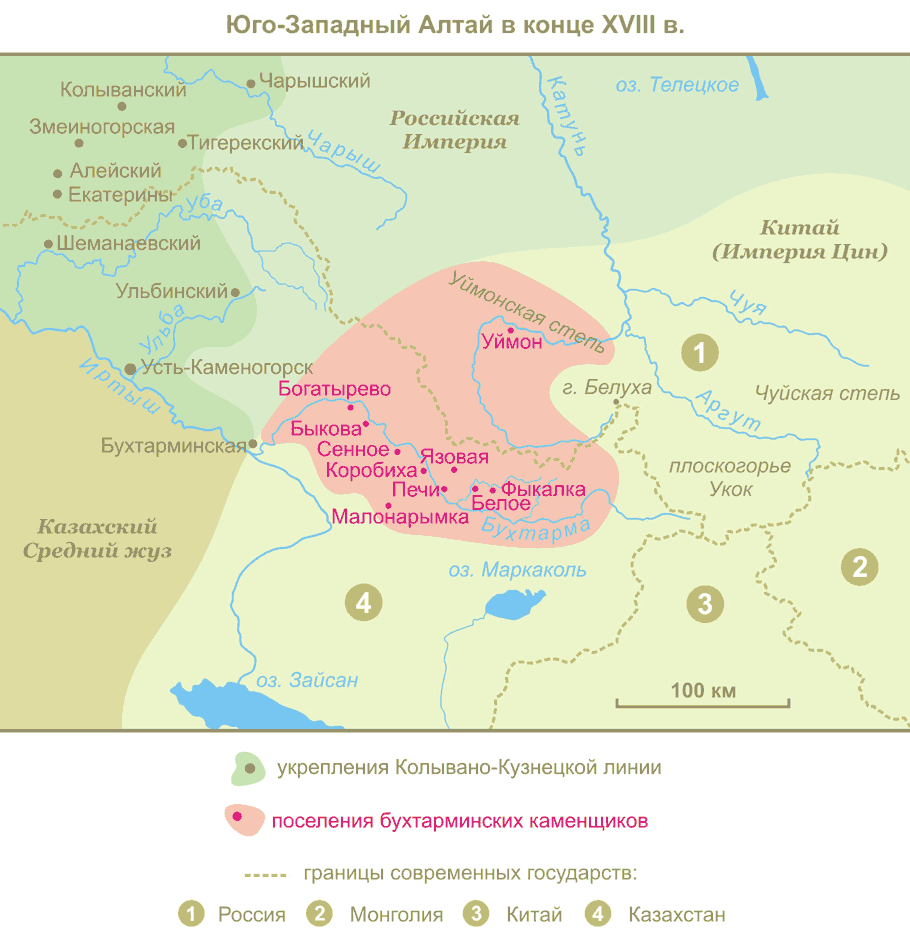 Карта расселения бухтарминских каменщиков в конце 18 века